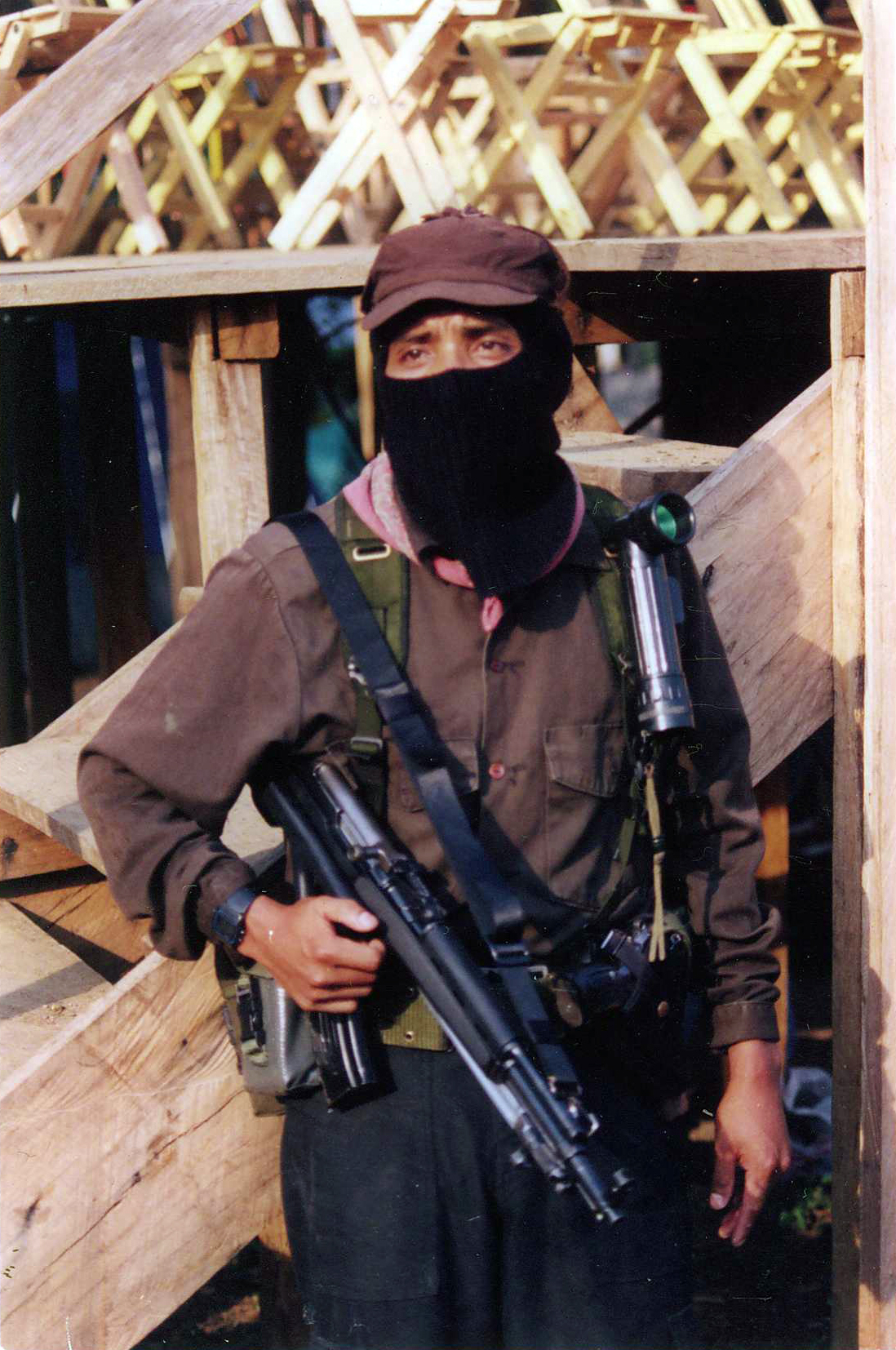 En La Realidad Chiapas, en 1999